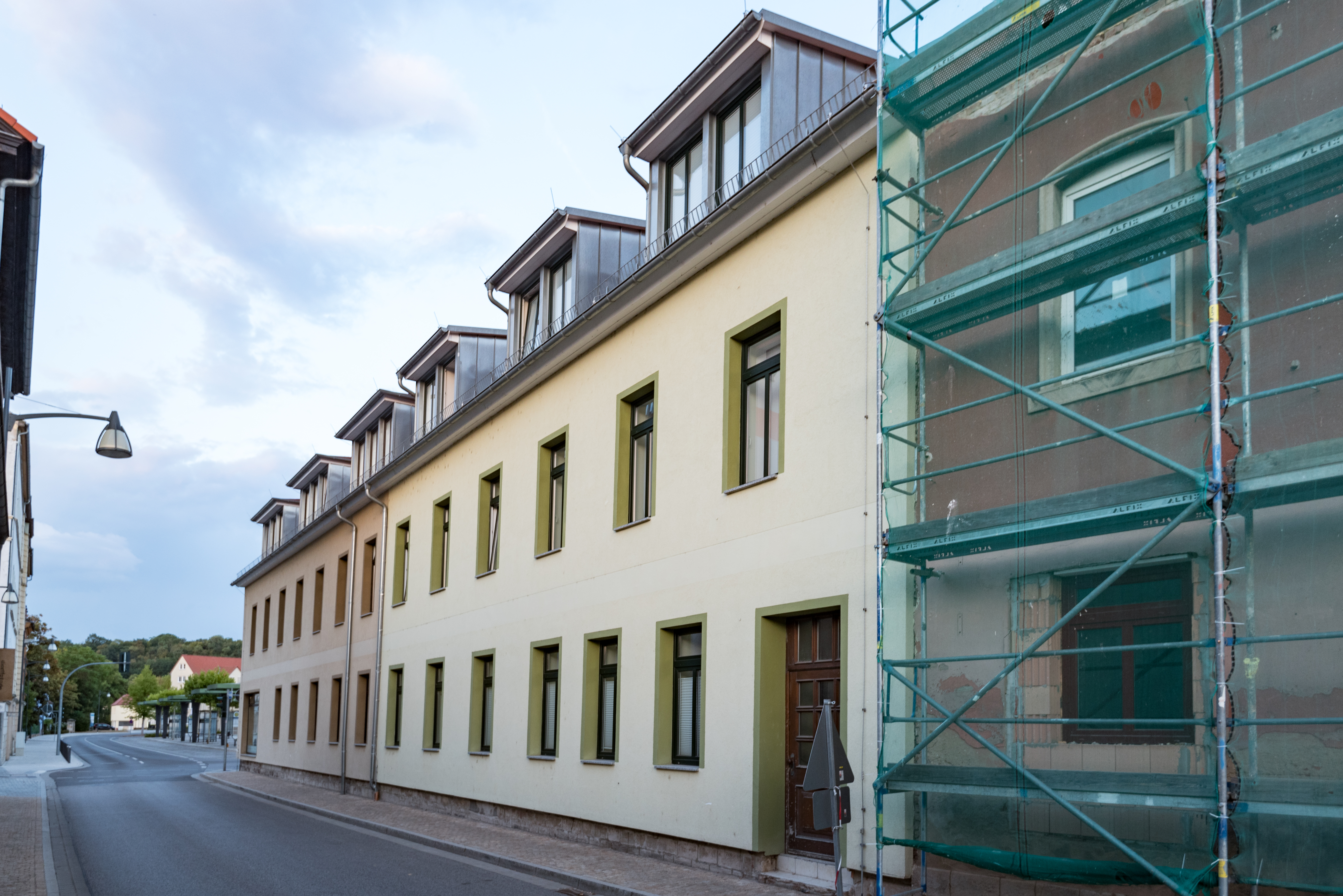 Weißenfels, Dammstraße 2